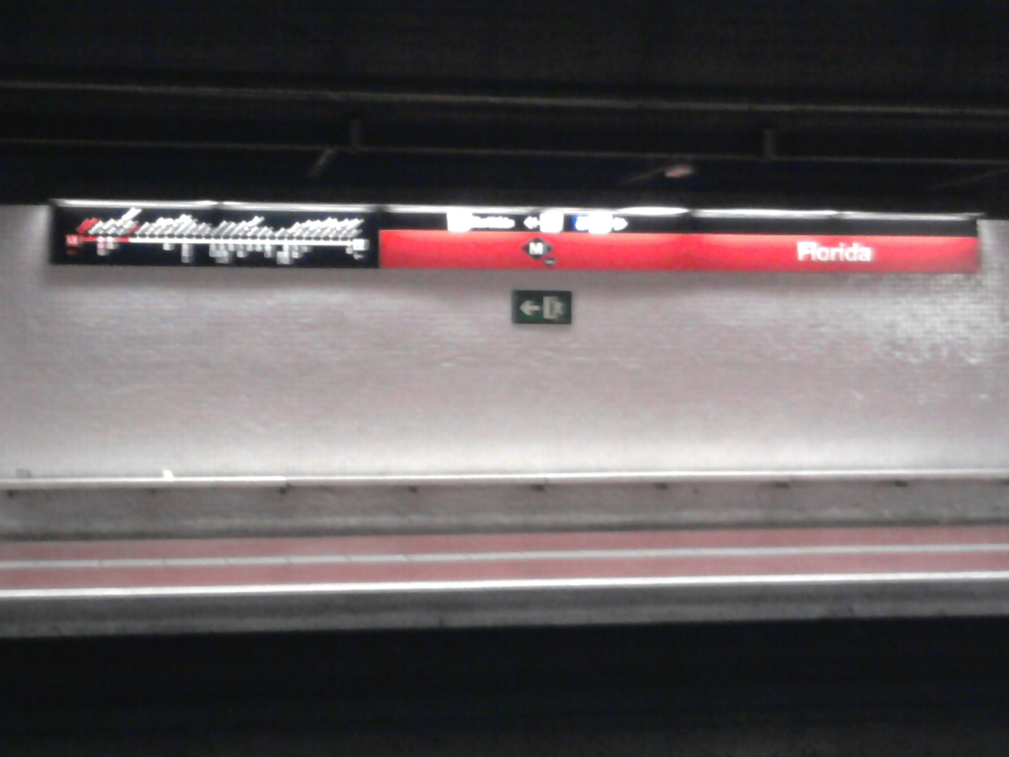 Foto capturada per la meva càmara a l'estació de Florida (Metro de Barcelona).